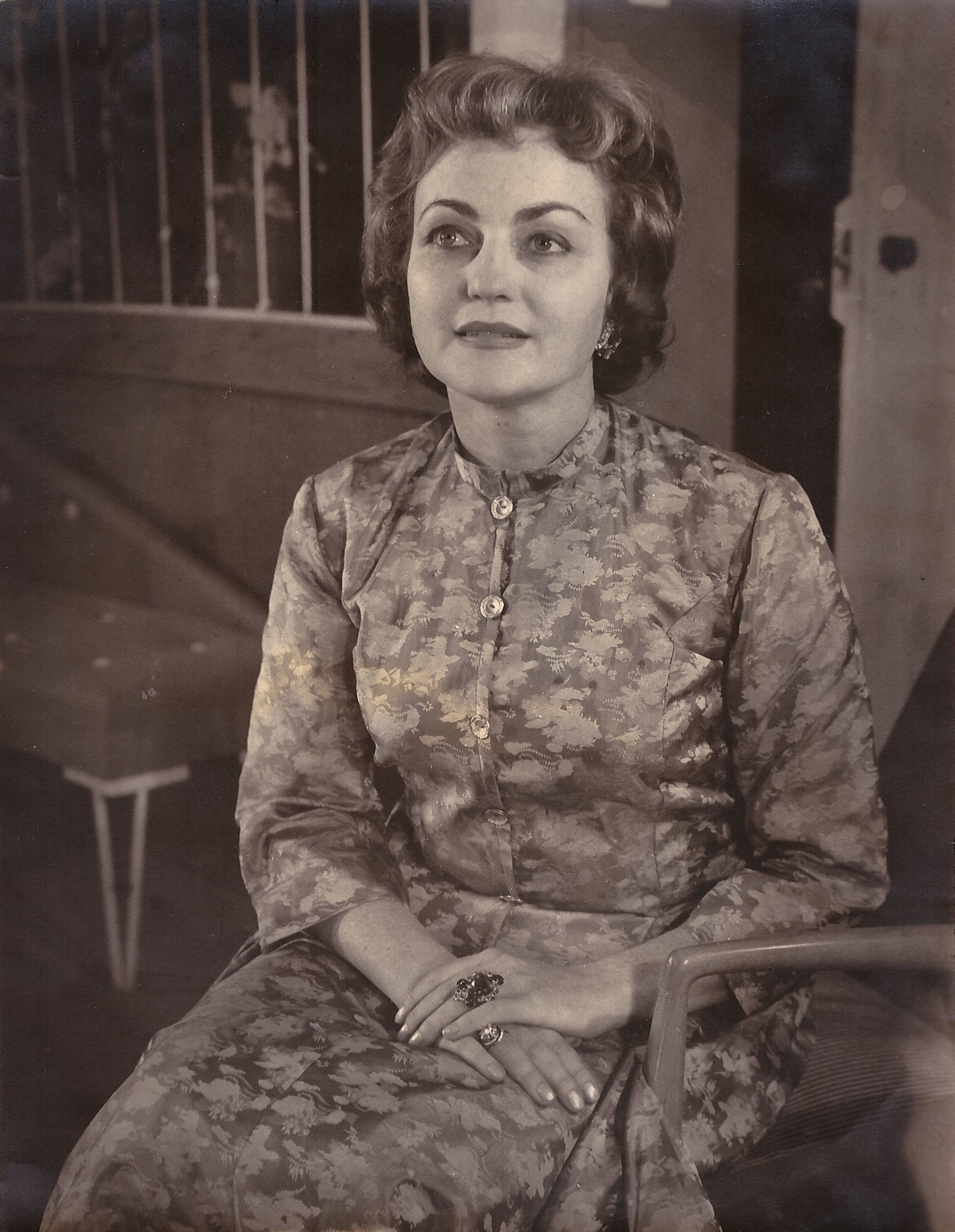 נחמה דוידית בהצגה "תרגיל בחמש אצבעות"